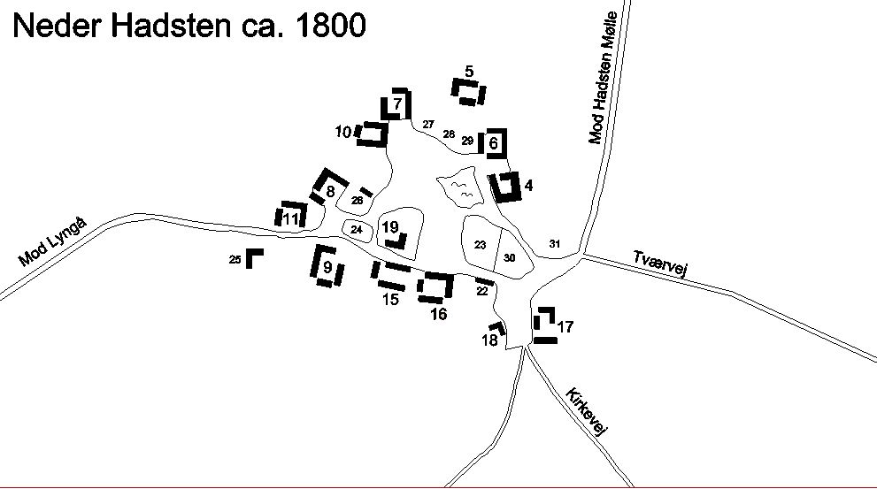 Neder Hadsten før udskiftningen i 1804